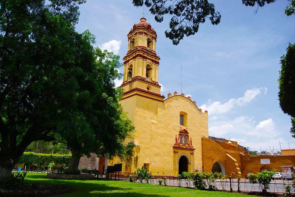 Ex-Convento Fransiscano del Siglo XVI- Jiutepec, Morelos.